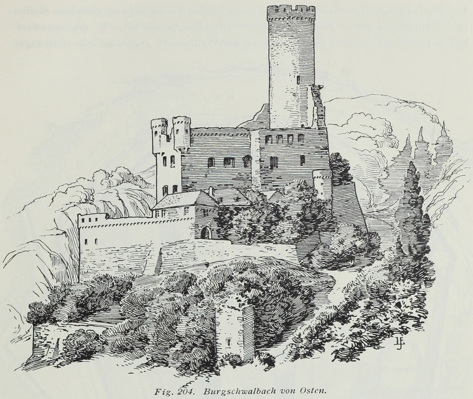 Burgschwalbach von Osten